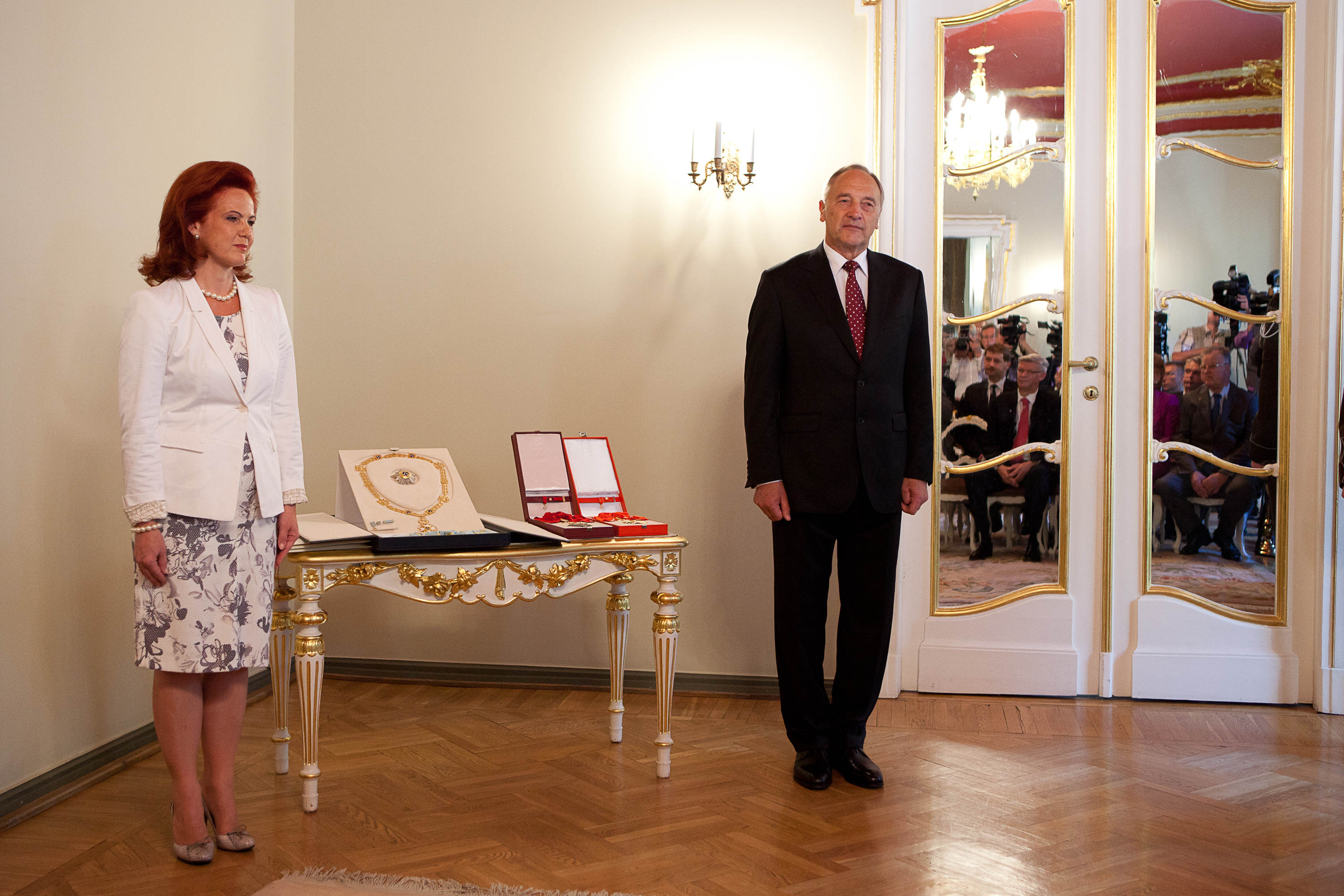 Andris Bērziņš and Solvita Āboltiņa 2011.gada 8.jūlijs. Valsts prezidents Andris Bērziņš saņem valsts apbalvojumus. Attēlā no kreisās: Saeimas priekšsēdētāja Solvita Āboltiņa, Valsts prezidents Andris Bērziņš. Foto: Saeima